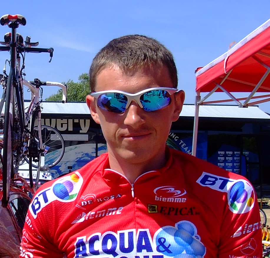 Andrei Kunitski - 1ª tappa giro d'italia 2007 - foto: Usai Gavino